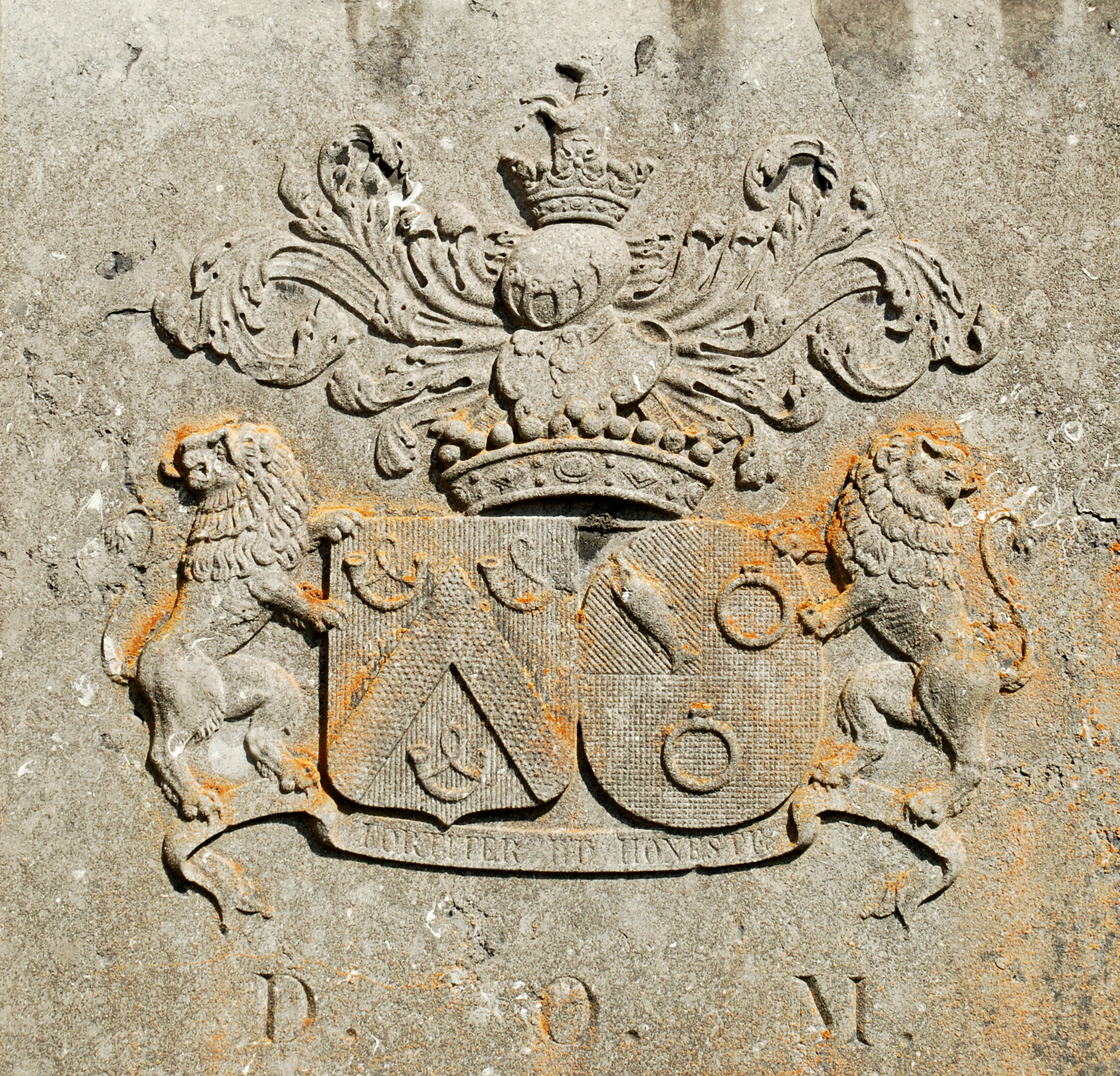 Belgique - Brabant wallon - Église Saint-Martin de Ways - Dalle funéraire du comte Cornet d'Elzius